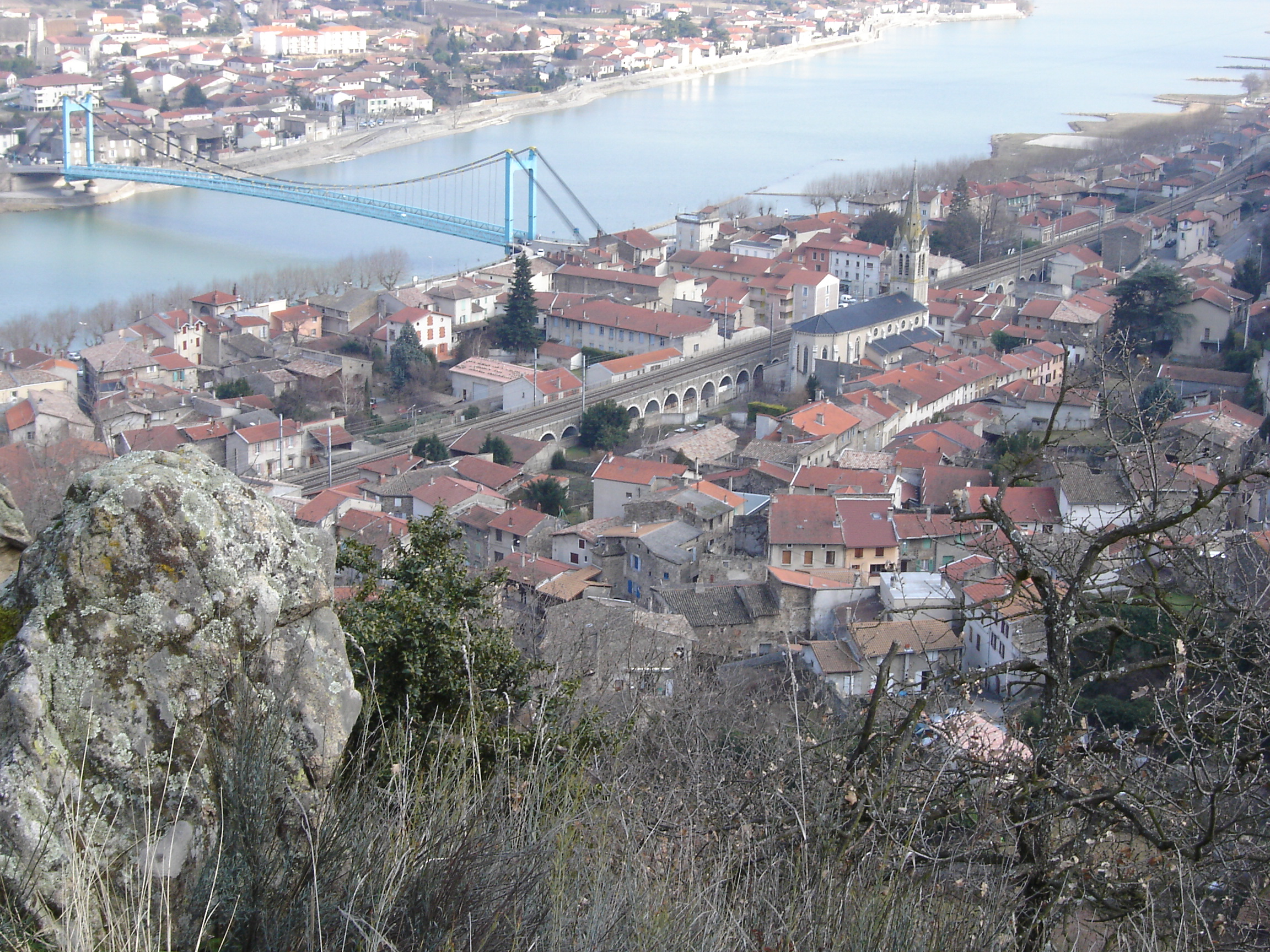 Serrières vue générale.